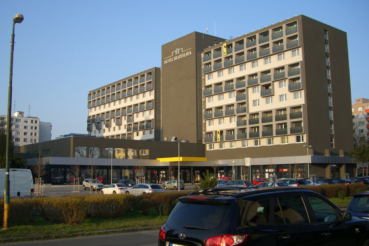 Hotel Bratislava, Bratislava/Ruzinov/Posen